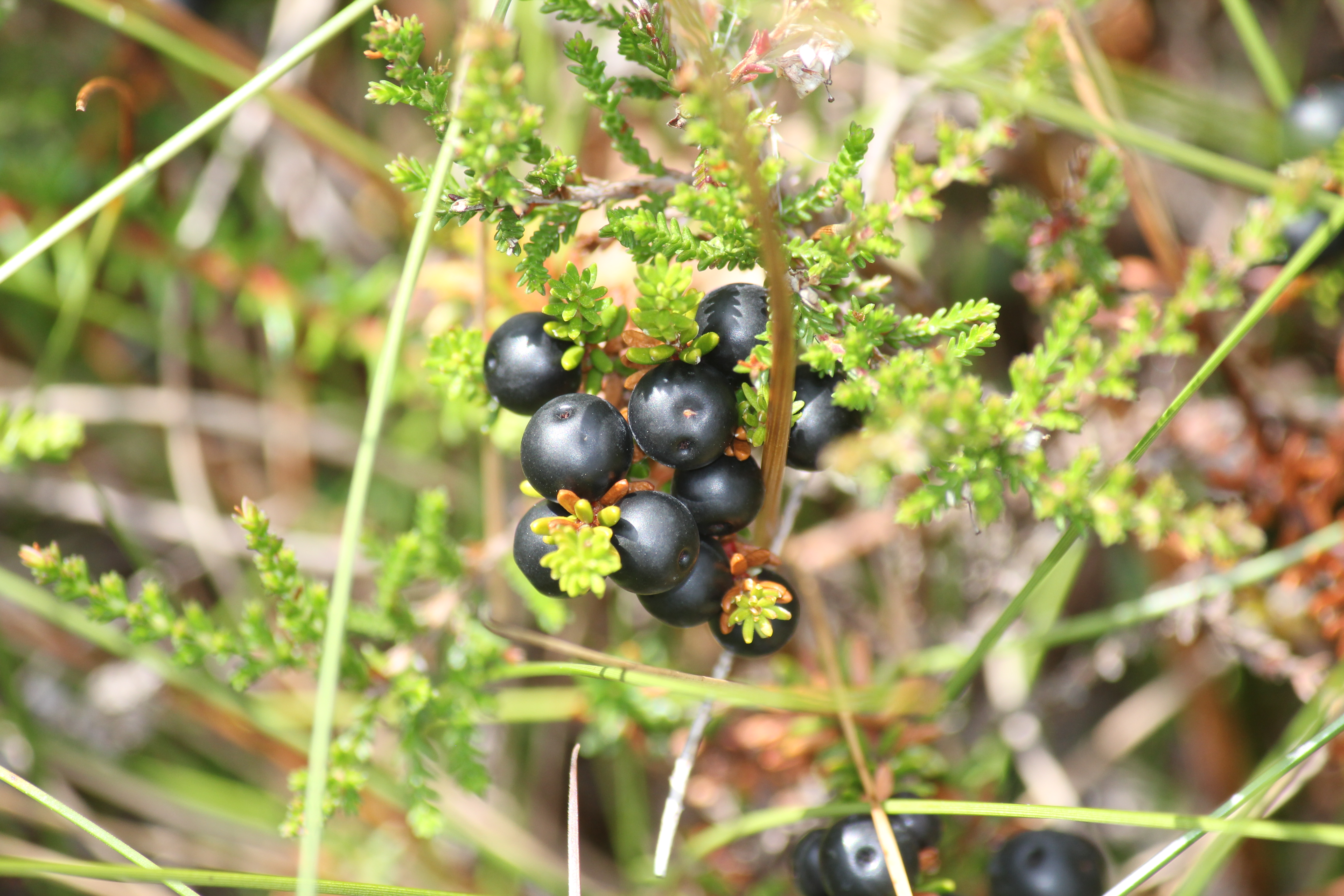 Schwarze Krähenbeere im Schwarzen Moor in der Rhön, Germany Azərbaycanca=Empetrum nigrum Català=Empetrum nigrum Česky=Šicha černá Dansk=Almindelig Revling English=Empetrum nigrum Español=Empetrum nigrum Suomi=Variksenmarja Français=Empetrum nigrum Iñupiak=Paunġaq 日本語=ガンコウラン 한국어=시로미 Перем Коми=Пончӧд Коми=Пончӧд Lietuvių=Juodoji varnauogė Nederlands=Kraaihei Norsk nynorsk=Krekling Norsk bokmål=Krekling Polski=Bażyna czarna Sámegiella=Čáhppesmuorji Seeltersk=Heedebäie (Empetrum) Svenska=Kråkbär Türkçe=Empetrum nigrum Tiếng Việt=Empetrum nigrum 中文=岩高兰